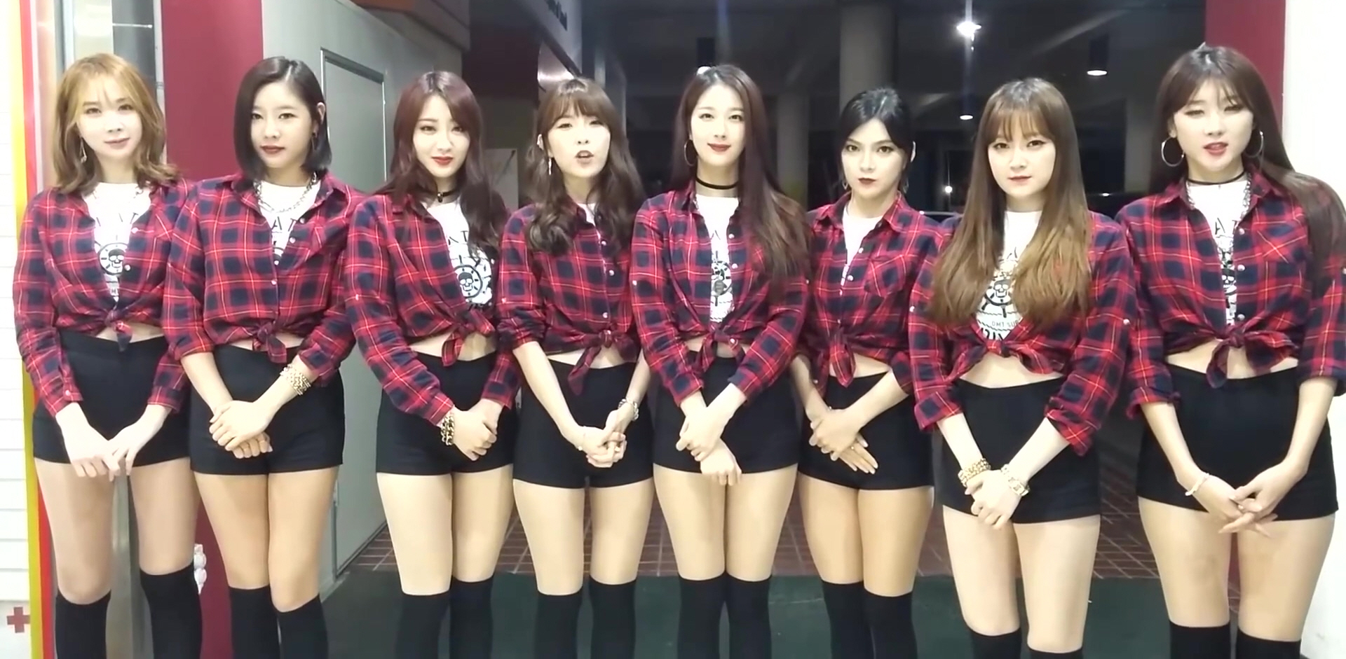 (싹튜브) 서울종합예술실용학교 SAC 날자 연예인 스타 축하메세지 1탄 - 나인뮤지스